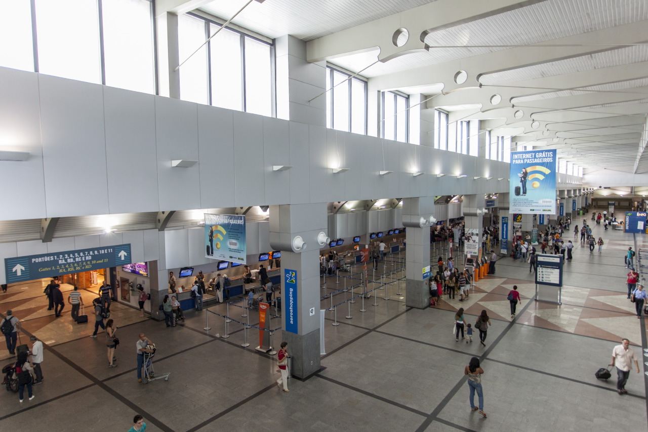 Interior do Aeroporto Internacional de Salvador, em Salvador.